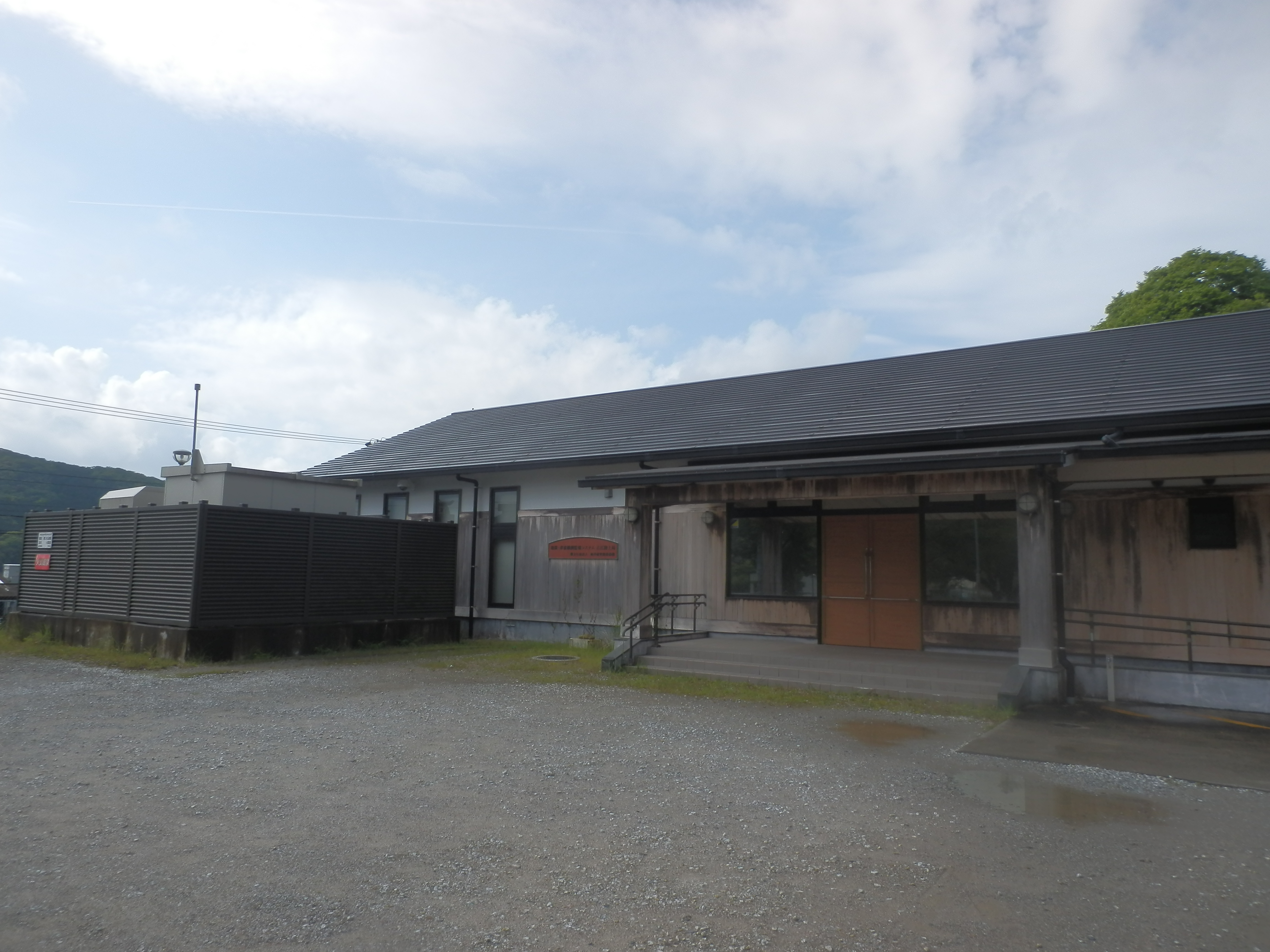 三重県尾鷲市の廃校になった小学校内に設置された防災科学技術研究所が管理・運用する地震・津波観測監視システム(DONET)の陸上局。ここで観測された南海トラフでの海底地震に伴う津波情報は、東海道新幹線の緊急停止用にも使われている。